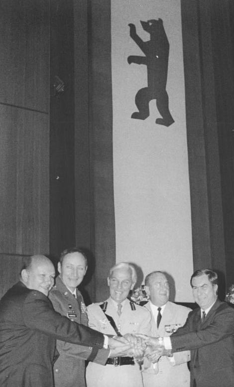 ADN-Bernd Settnik-2.10.90 Berlin: Der Regierende Bürgermeister Walter Momper (l) empfing im Rathaus Schöneberg die Stadtkommandanten der USA, Raymond Haddock, Großbritanniens, Robert Corbett und Frankreichs, Francois Dann v.l.n.r. Die Alliierte Kommandatur in Berlin beendete wenige Stunden vor der deutschen Einheit ihre Arbeit. An der Begegnung nahm auch der Präsident des Abgeordnetenhauses, Jürgen Wohlrabe (r) teil.